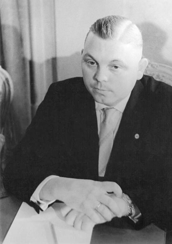 Zentralbild/Sturm 12.9.1960 Berlin: Konstituierende Sitzung des Staatsrates der DDR. Am Nachmittag des 12. September trat der Staatsrat der Deutschen Demokratischen Republik unter Leitung des Vorsitzenden des Staatsrats, Genossen Walter Ulbricht, im Amtssitz des Staatsrates in Berlin-Niederschönhausen zu seiner konstituierenden Sitzung zusammen. UBz: Karl Rieke, Vorsitzender der LPG Rogaesen, Mitglied des Staatsrats.